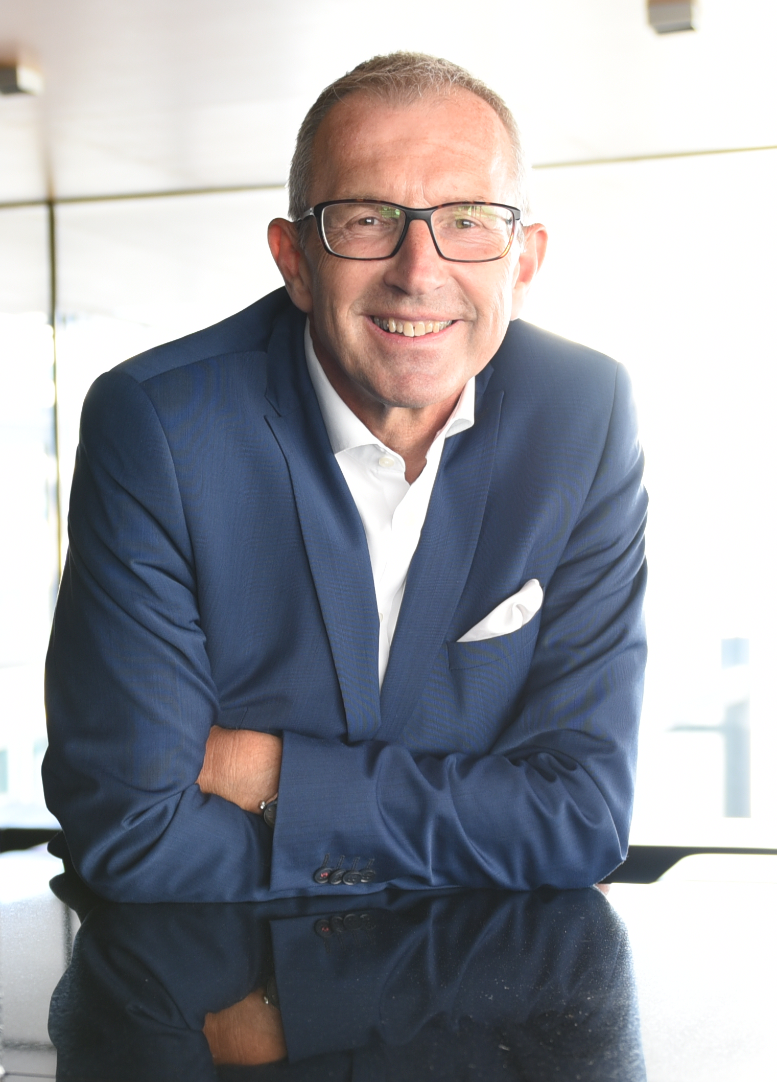 Das Portrait zeit Andreas Altmann im Jänner 2020. Dabei hat er hat seine Hände auf einem Tisch aufgestützt.